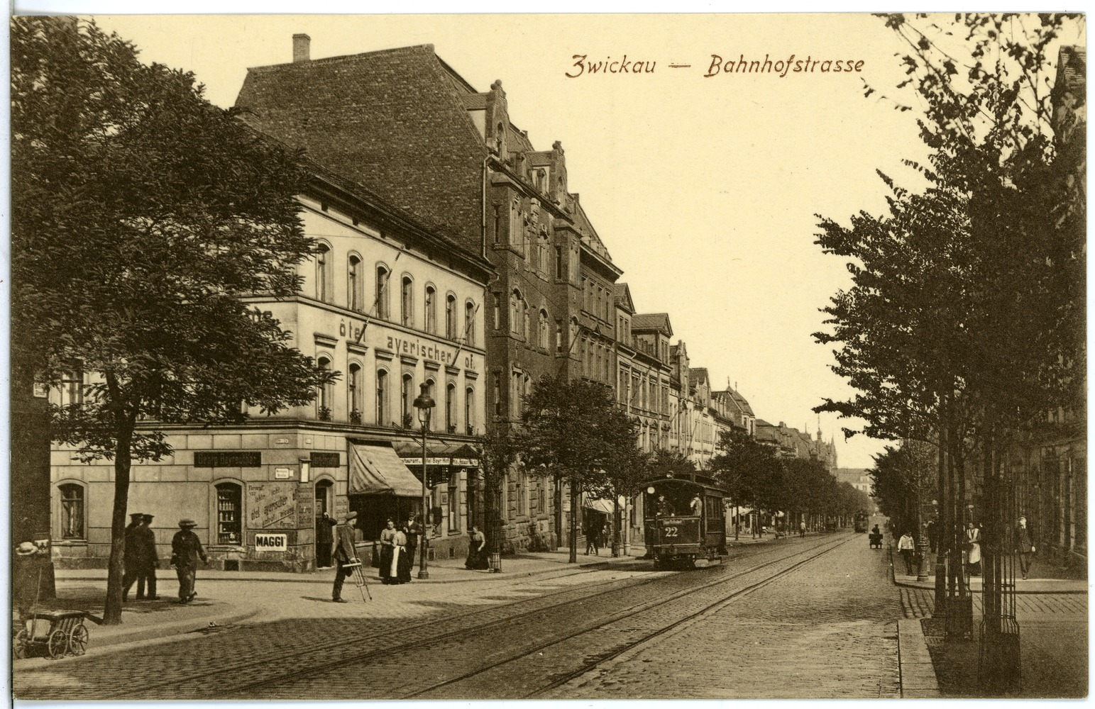 Zwickau; Bahnhofstraße This postcard is from publisher Brück & Sohn in Meißen ( postcard has a unique number 19893 and is available in a higher resolution at the publisher. This images was uploaded in a cooperation project between Wikipedians and the publisher.